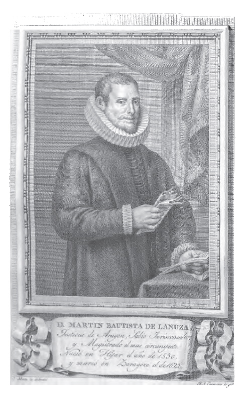 Retrato de Martín Bautista de Lanuza.